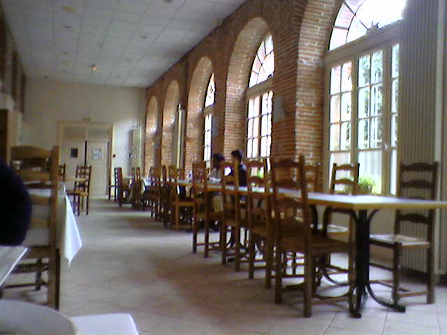 Restaurant universitaire de l'Institut Catholique à Toulouse.